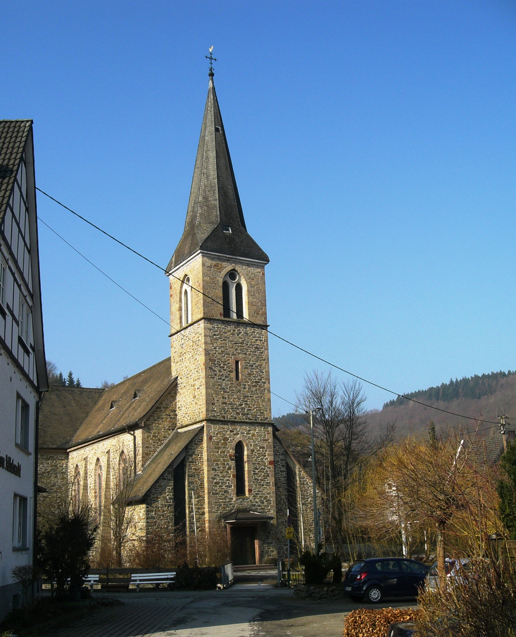 Pfarrkirche der Kirchengemeinde St. Agatha Bilstein